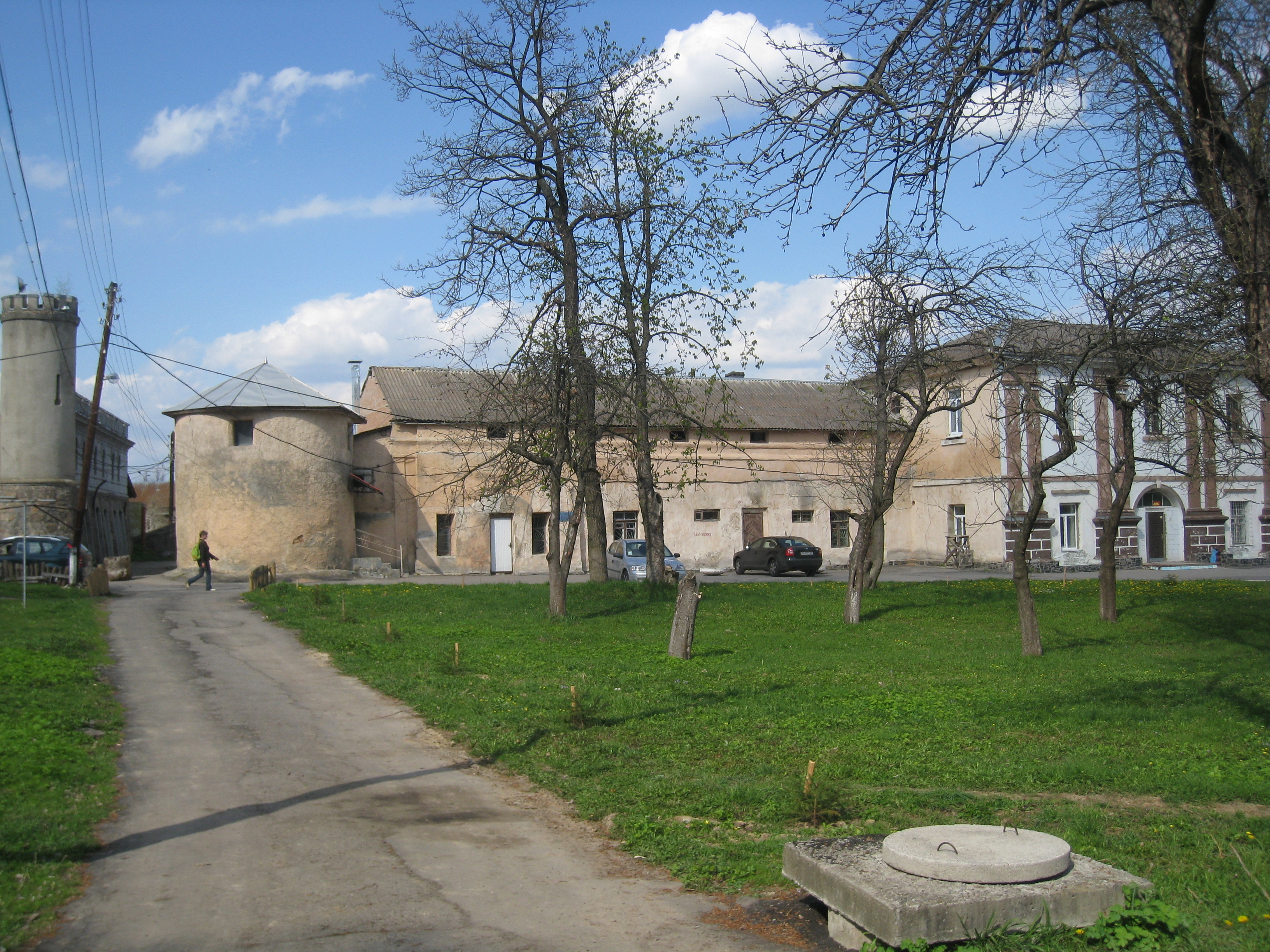 Колишня фортеця: тепер це зветься "Княжий град"